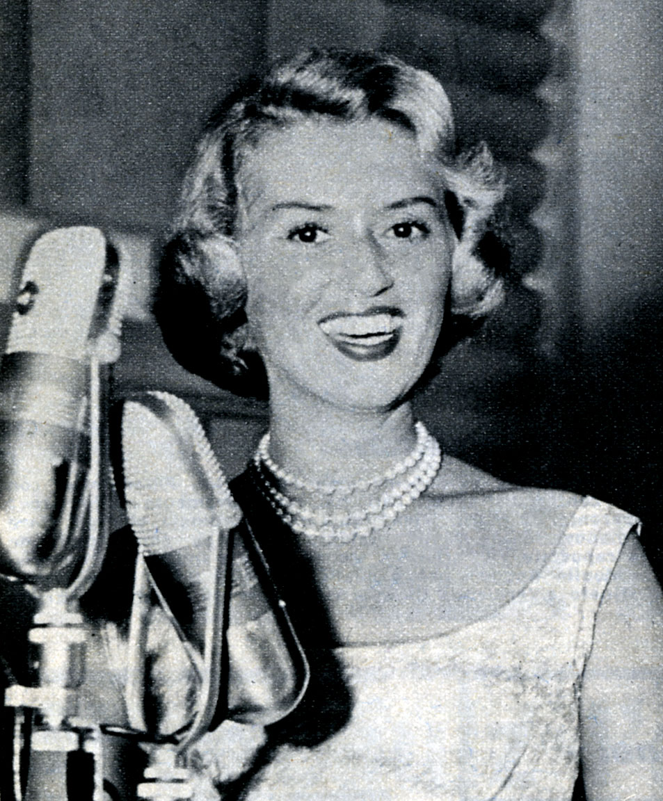 Photo from magazine Radiocorriere (1957)